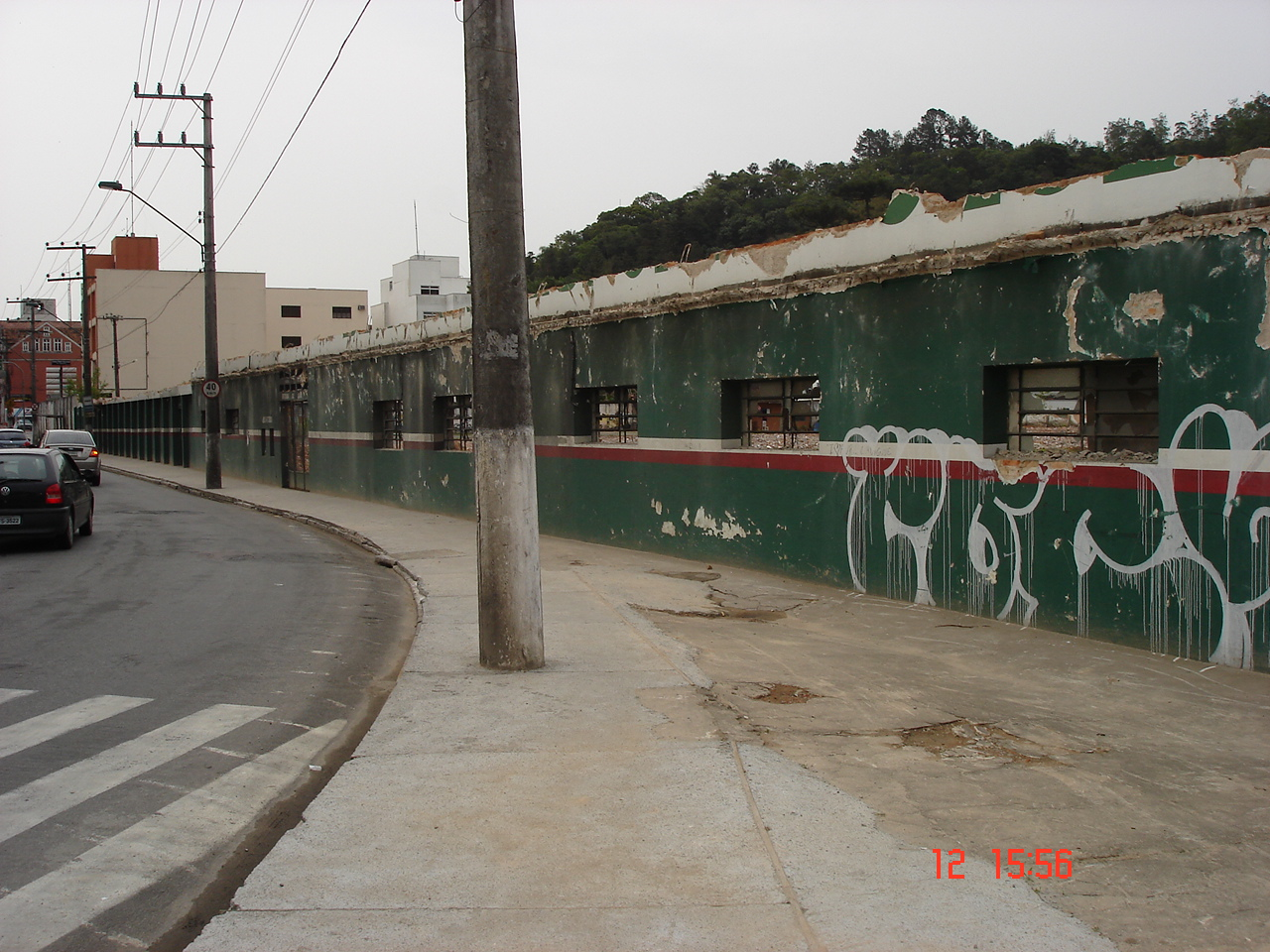 Foto do Estádio Aderbal Ramos da Silva, pós-demolição.